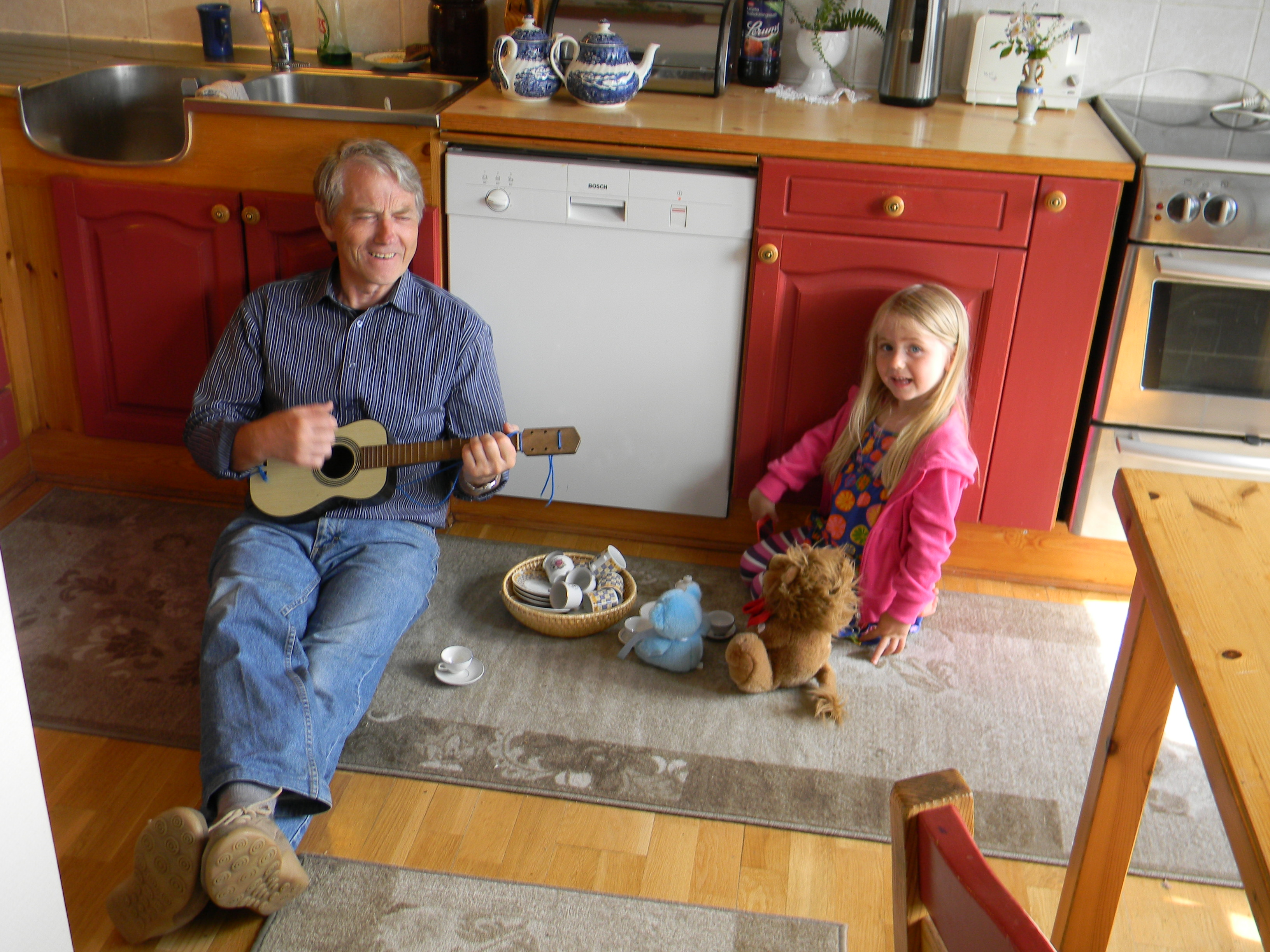 Rolf Hindhammer saman med eitt av barnebarna